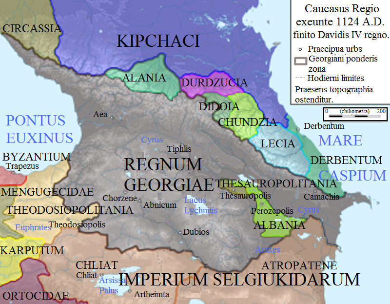 Caucasus anno Domini 1124